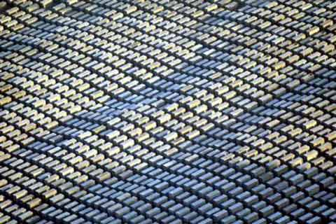 Holocaust memorial